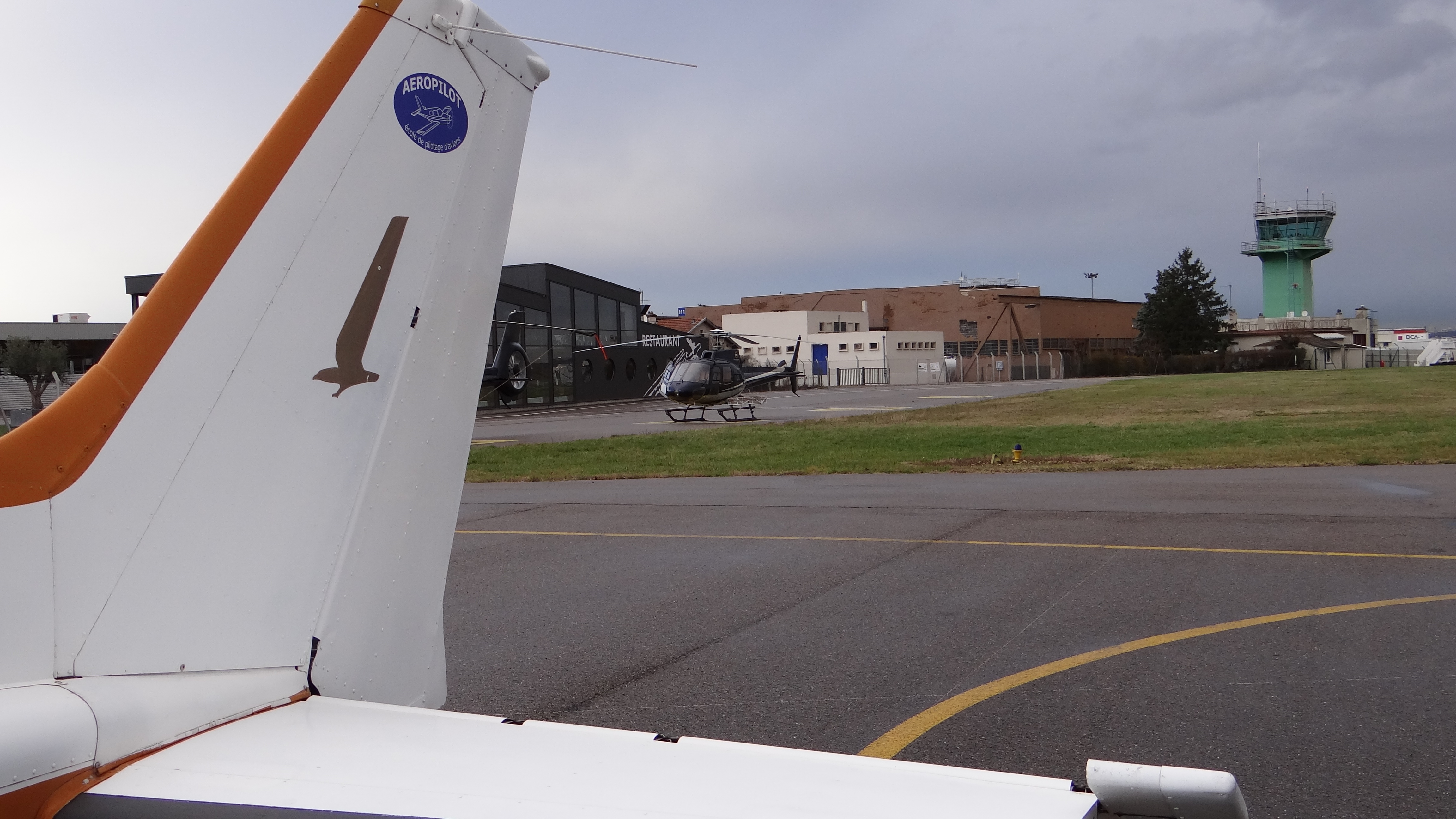 Aérodrome Lyon-Bron - tour de controle